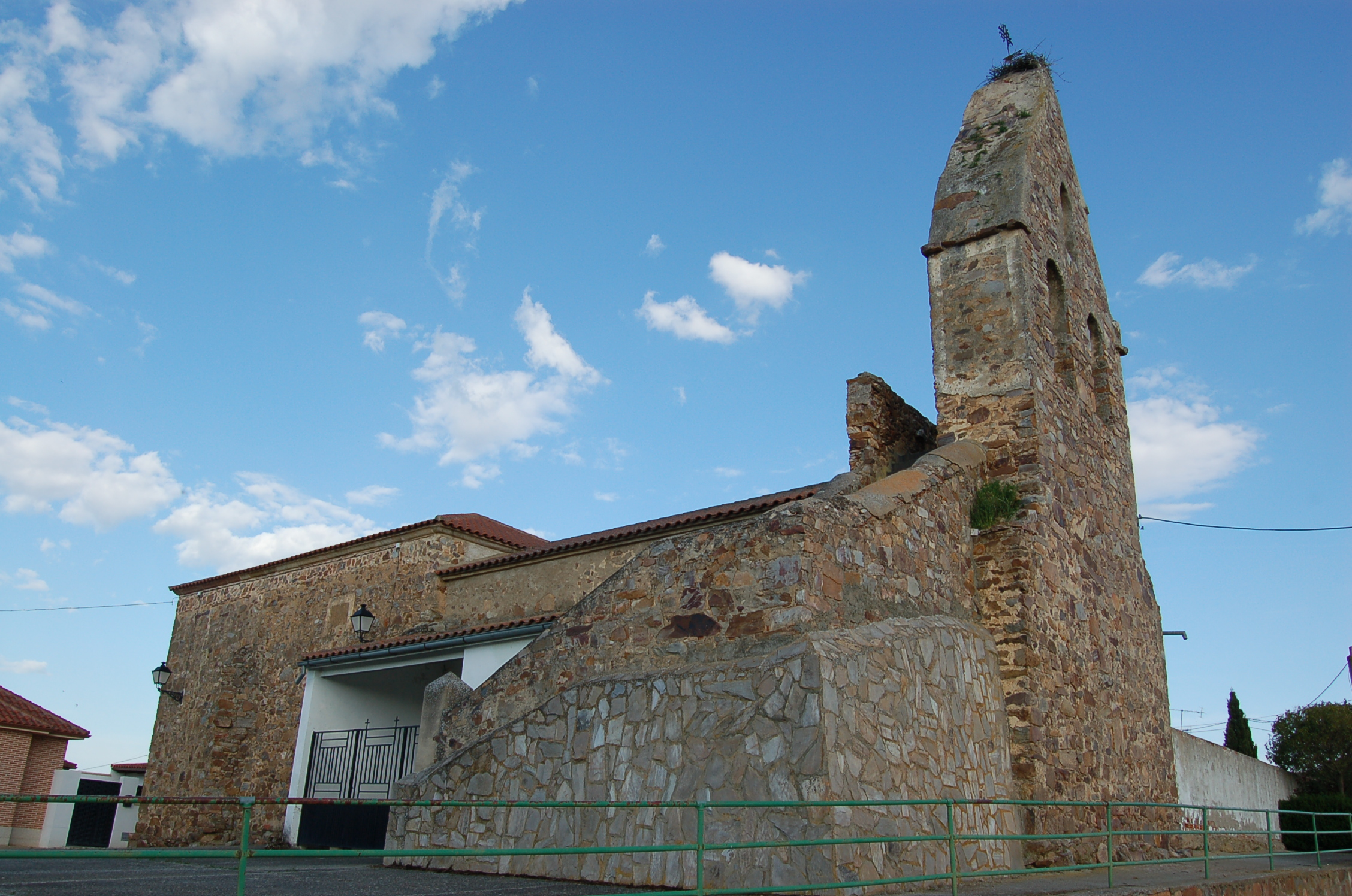 Igrexa de Pueblica de Valverde